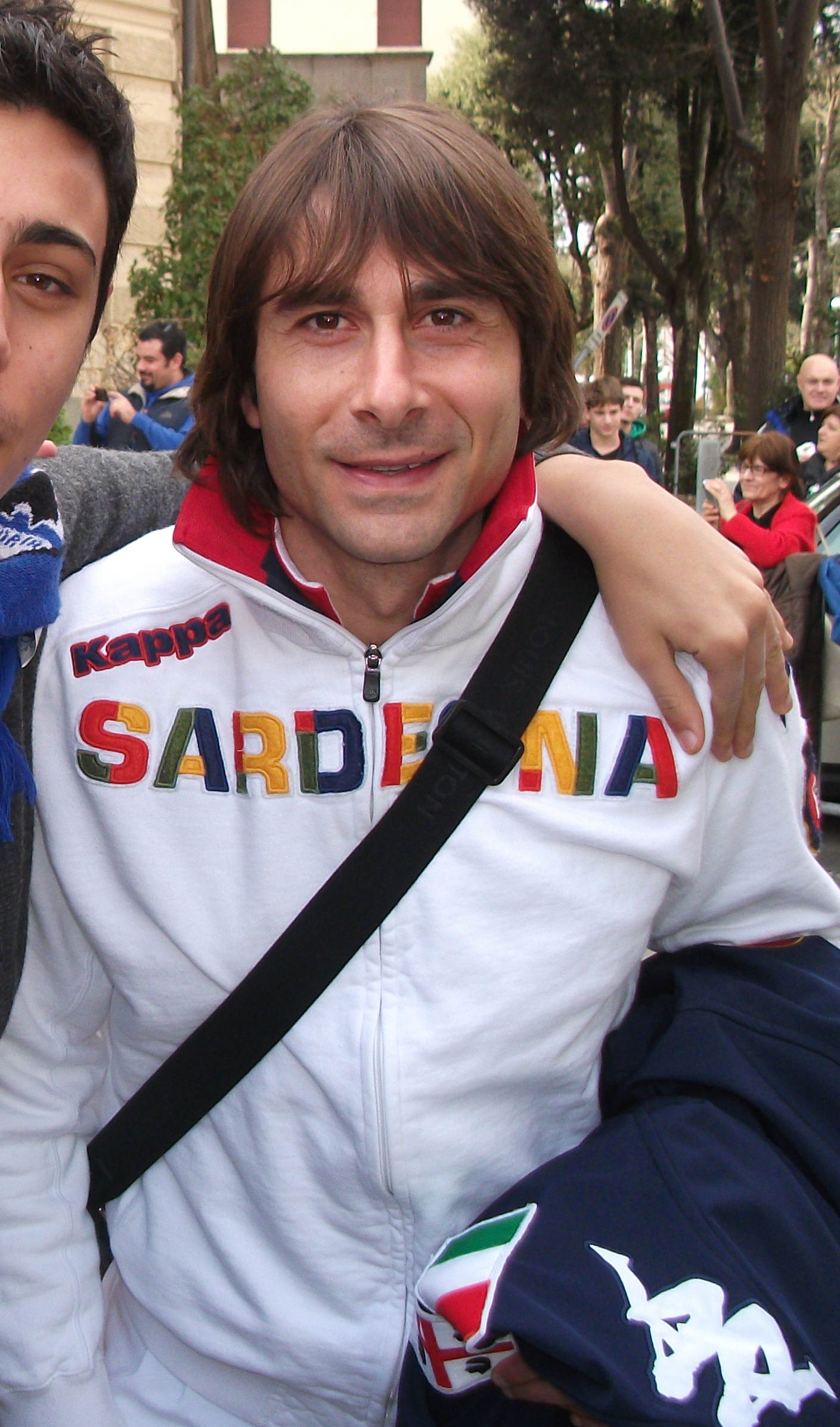 Daniele Conti prima della partita di Serie A, Siena - Cagliari del 4 marzo 2012.